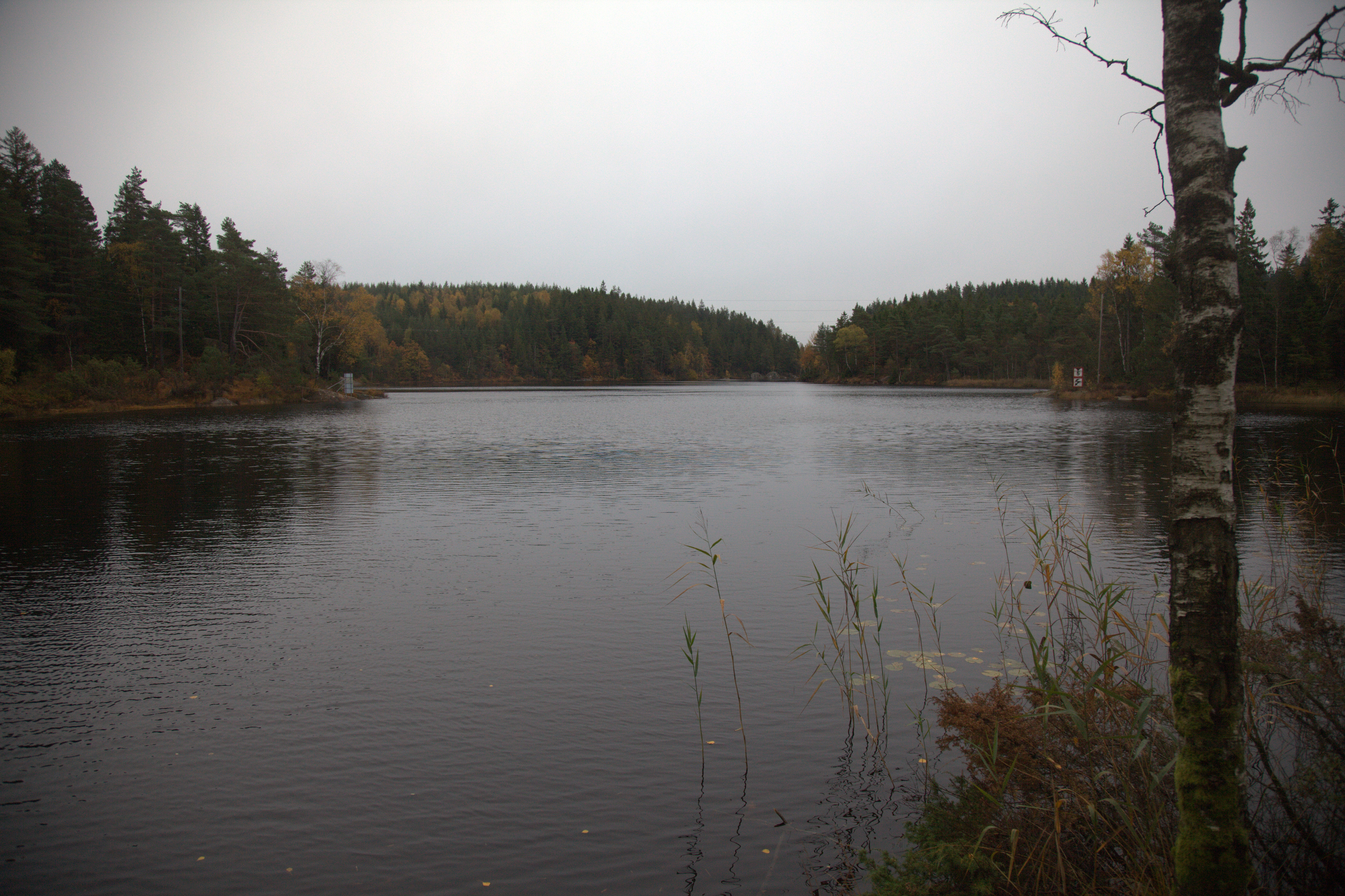 Mörtevatten i Kungälv